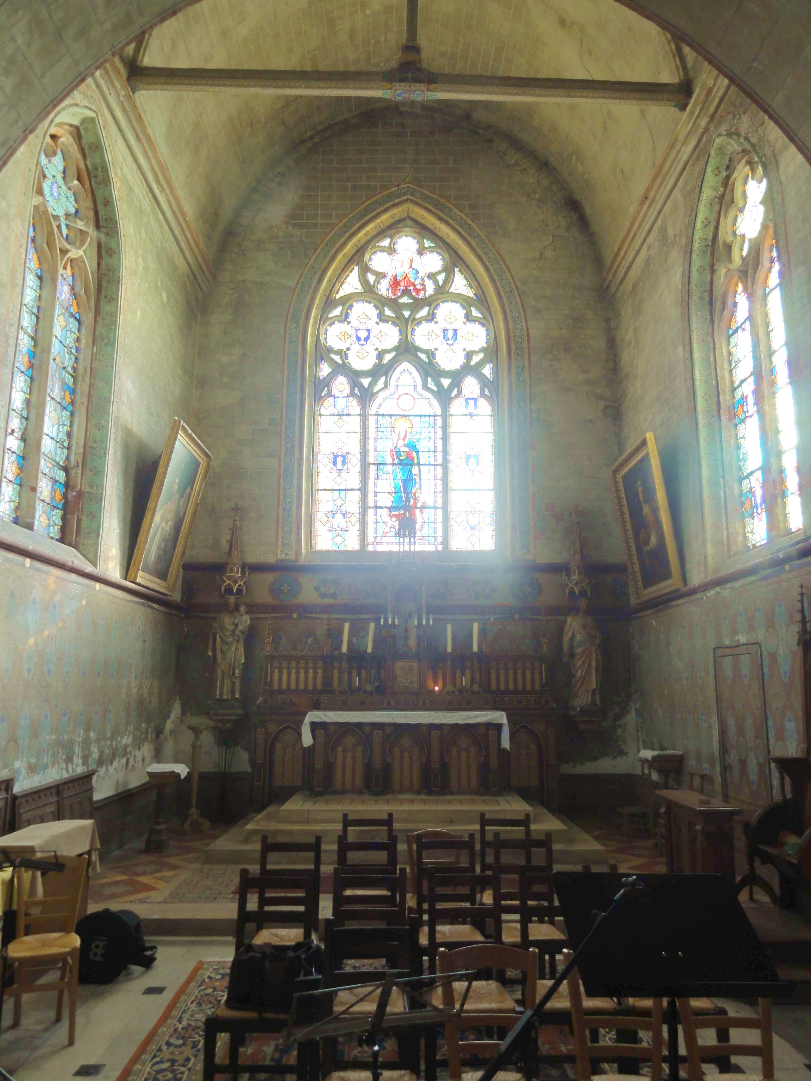 Chœur.